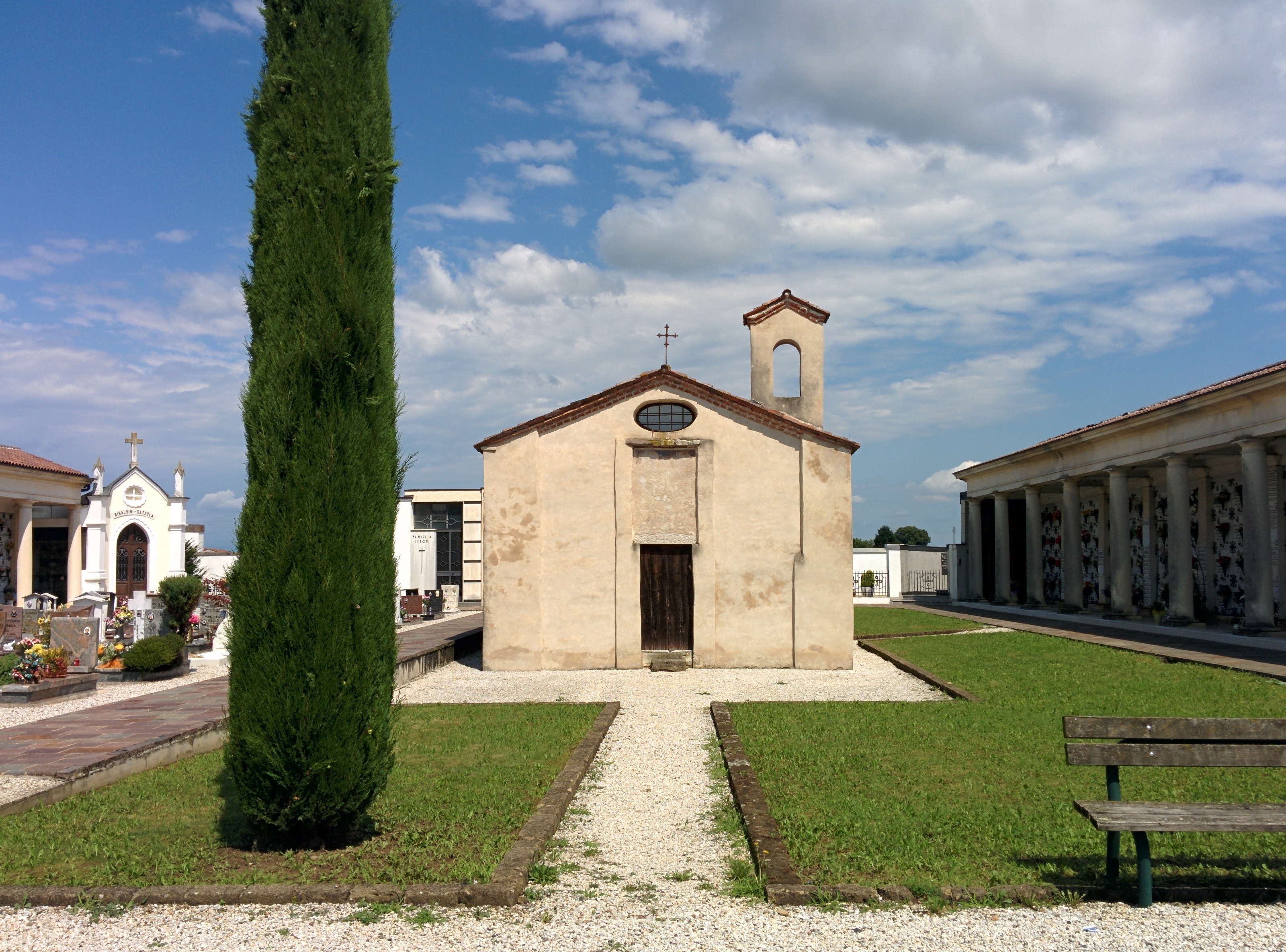 Facciata della chiesetta di San Michele a Caldogno, provincia di Vicenza.